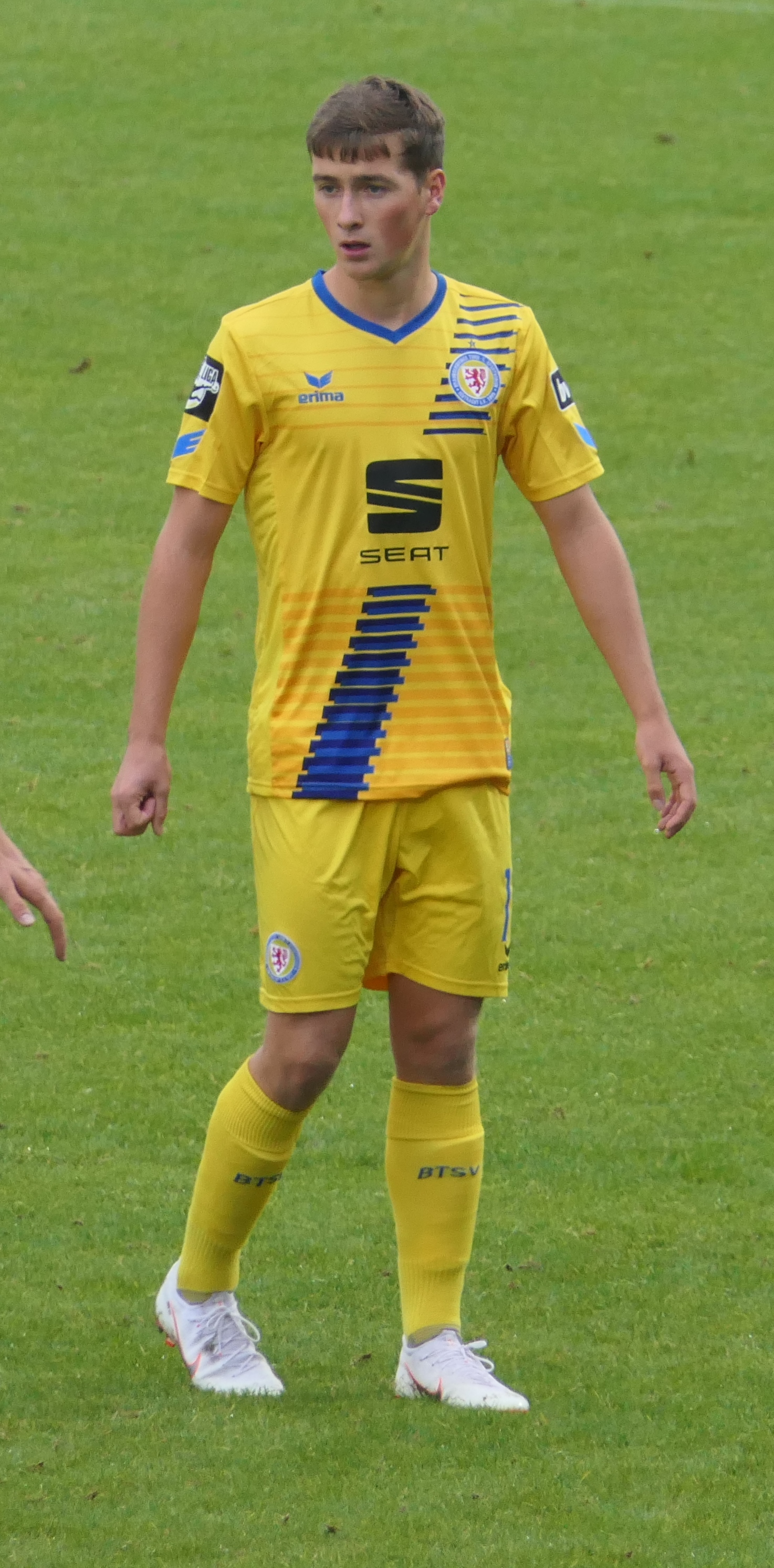 Der Fussballprofi Yari Otto im Trikot von Eintracht Braunschweig beim Auswärtsspiel bei der SpVgg Unterhaching am 01.09.2018.